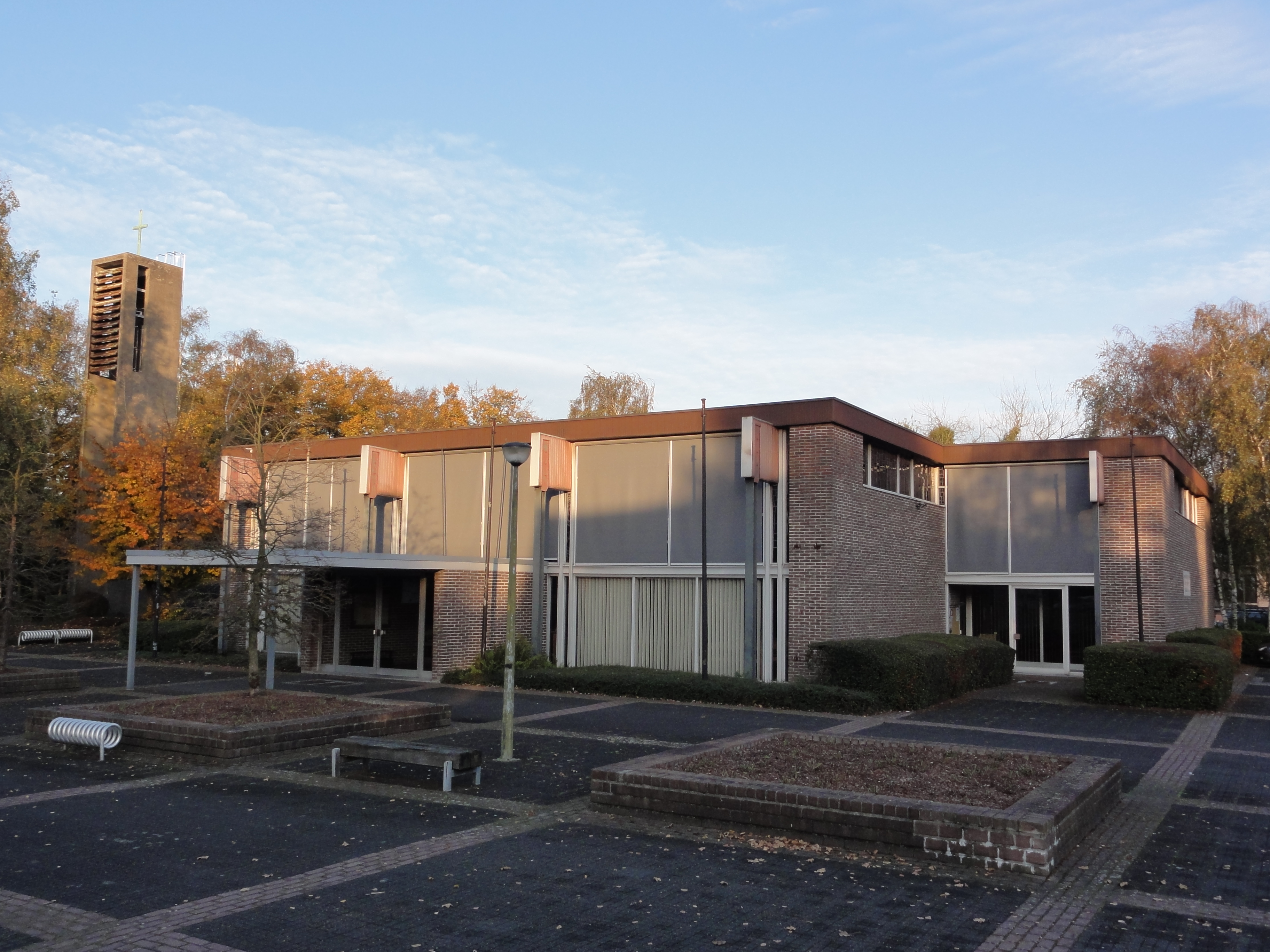 Heilig Hartkerk in de wijk Cauwerburg in Temse. Heilig Hartkerk (Church of Sacred Heart) in the Cauwerburg quarter in Temse. Temse, East Flanders, Belgium